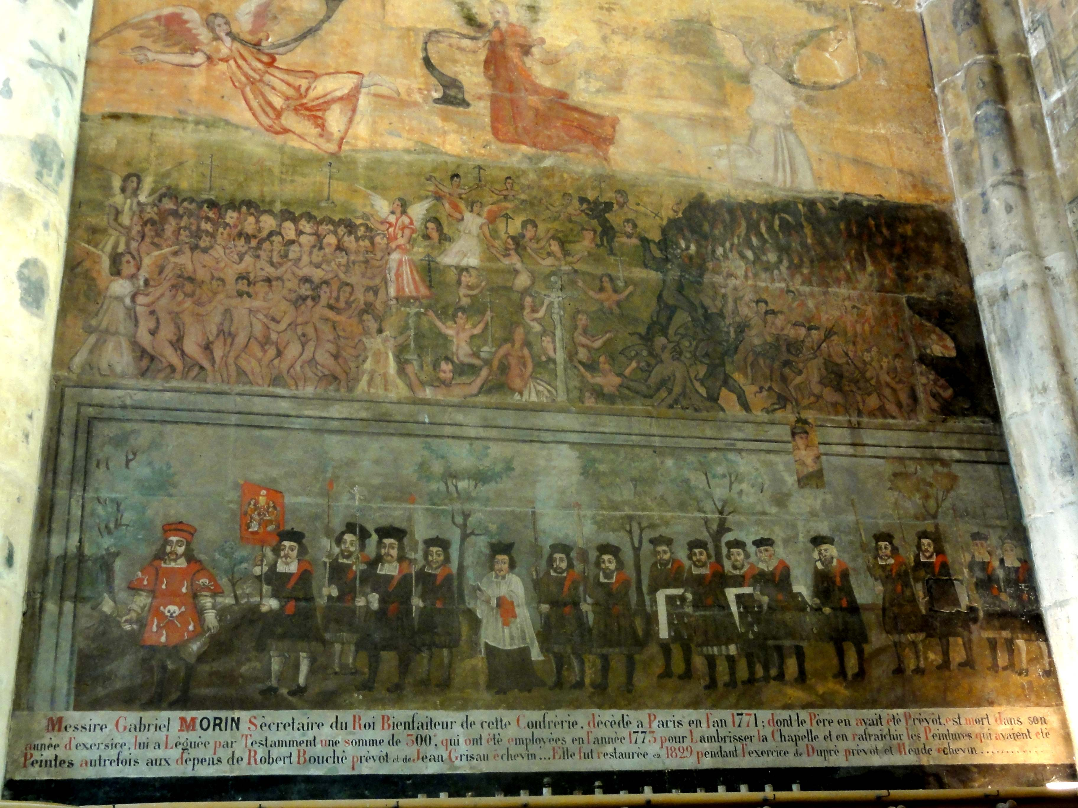 Chapelle de la Charité, peintures murales côté ouest - procession funéraire.